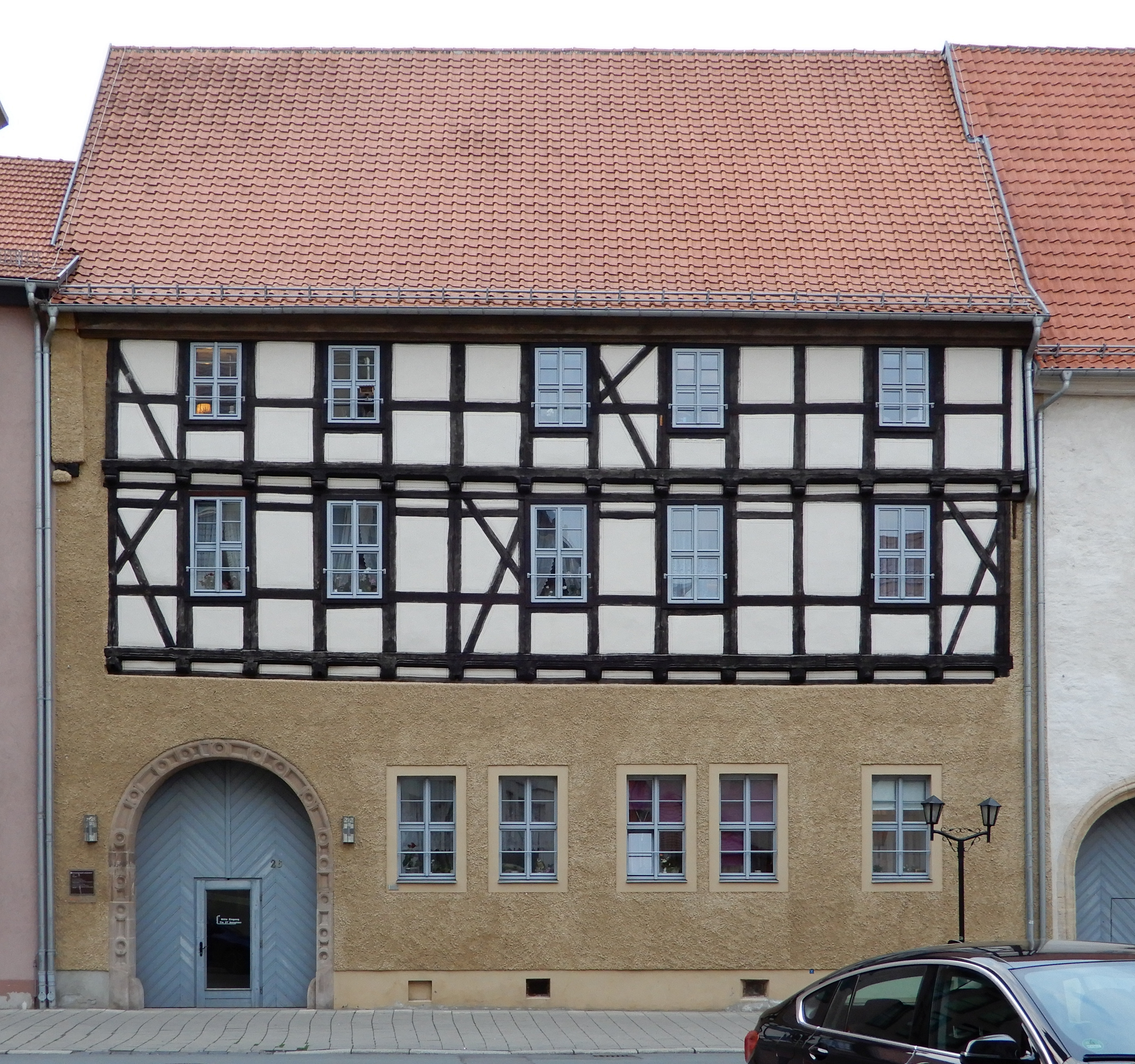 Gebäude Tie 26 in Aschersleben